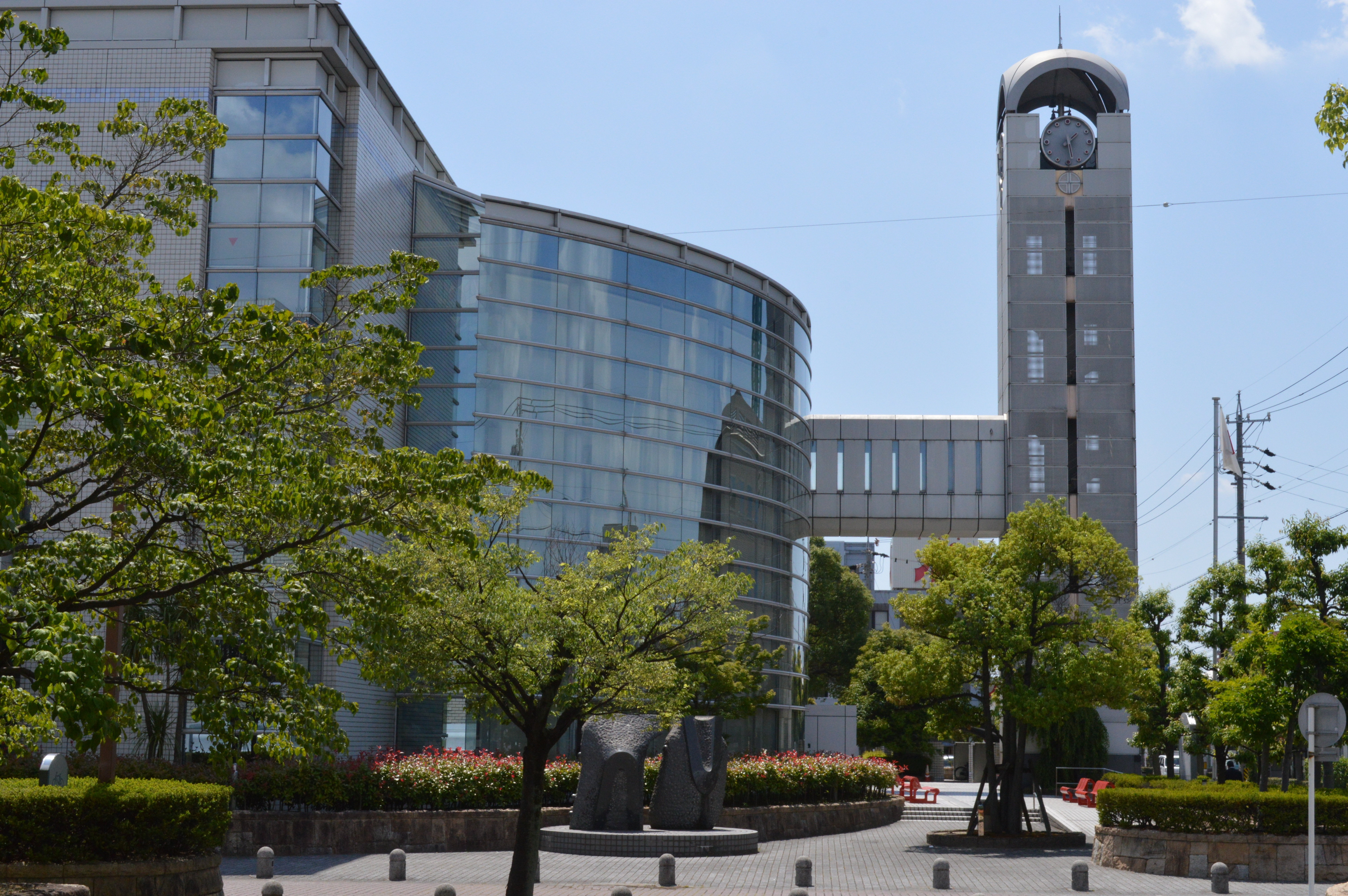 刈谷市図書館を構成する刈谷市中央図書館